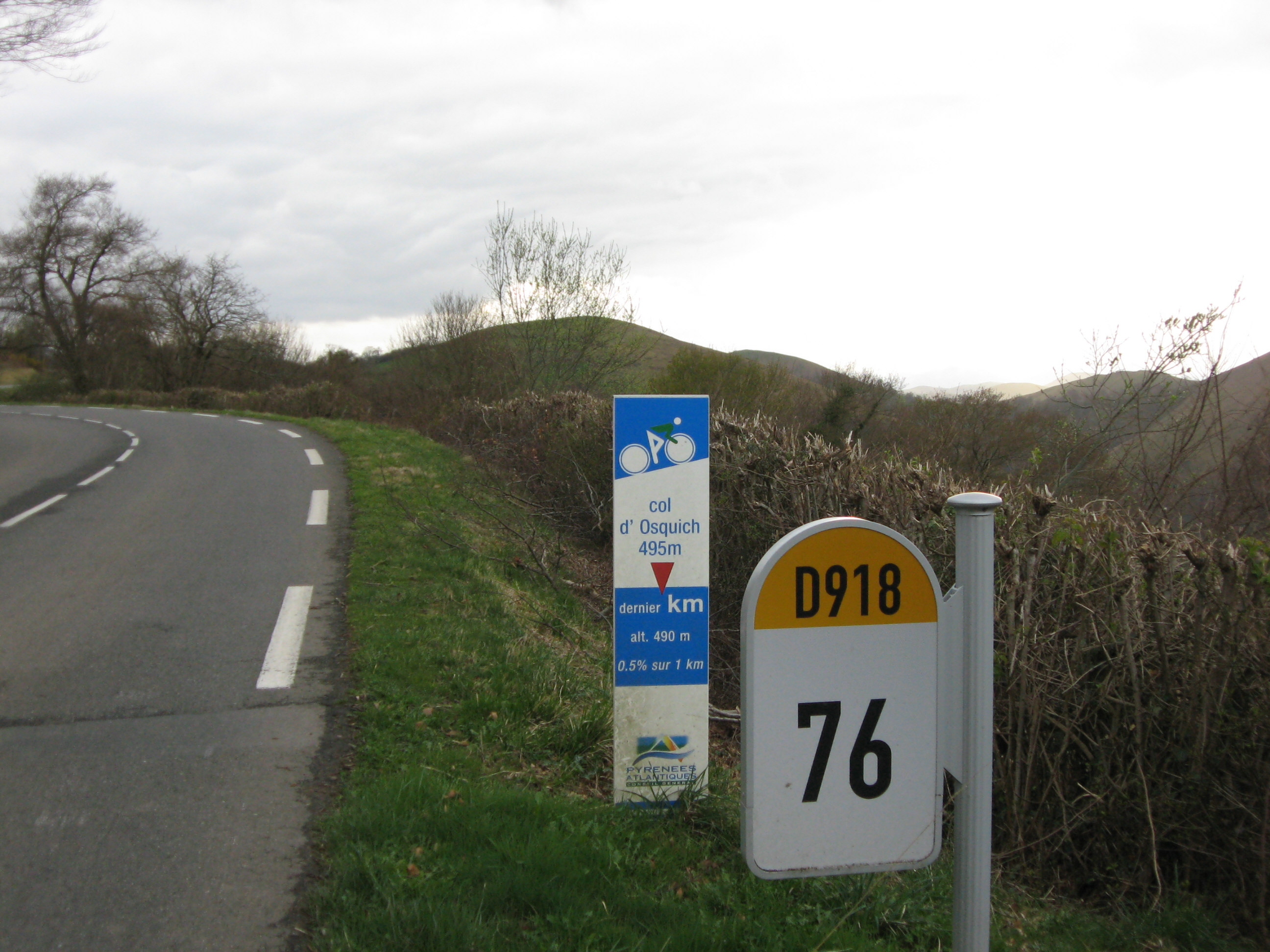 Col d'Osquich (Soule) (Pyrénées-Atlantiques) (Pyrénées).